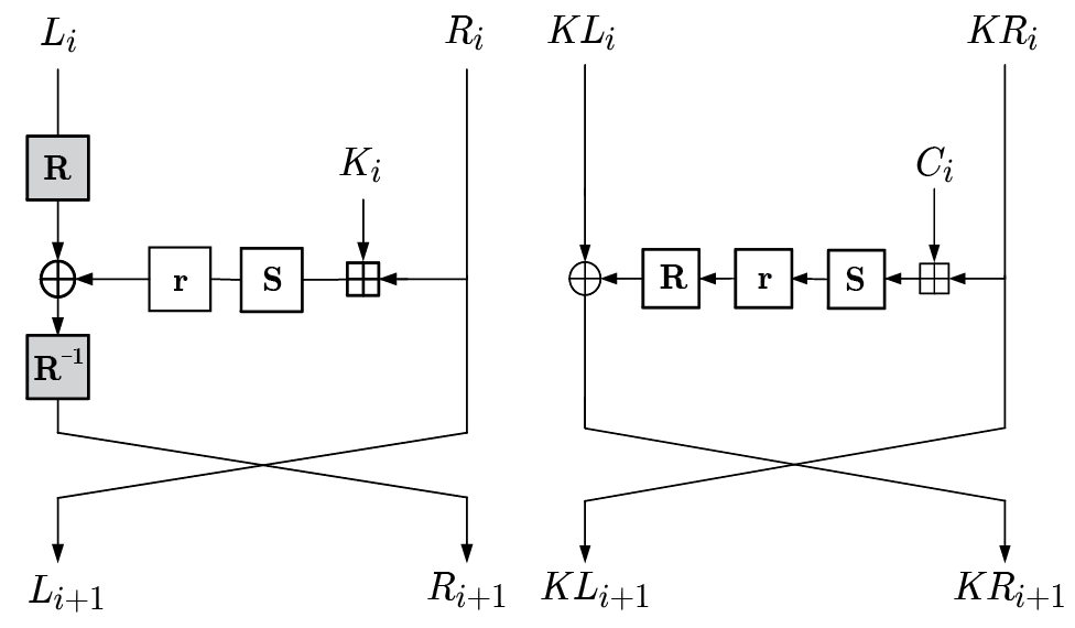 פונקציית הסבב הפנימית של SEA